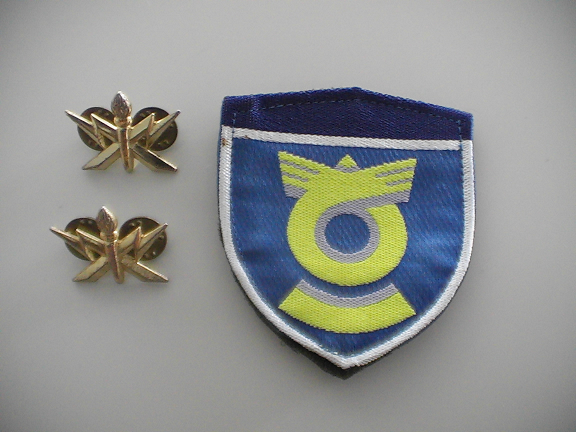 防衛大臣直轄の通信科部隊隊員が着用する部隊章と職種徽章。投稿者本人が撮影。